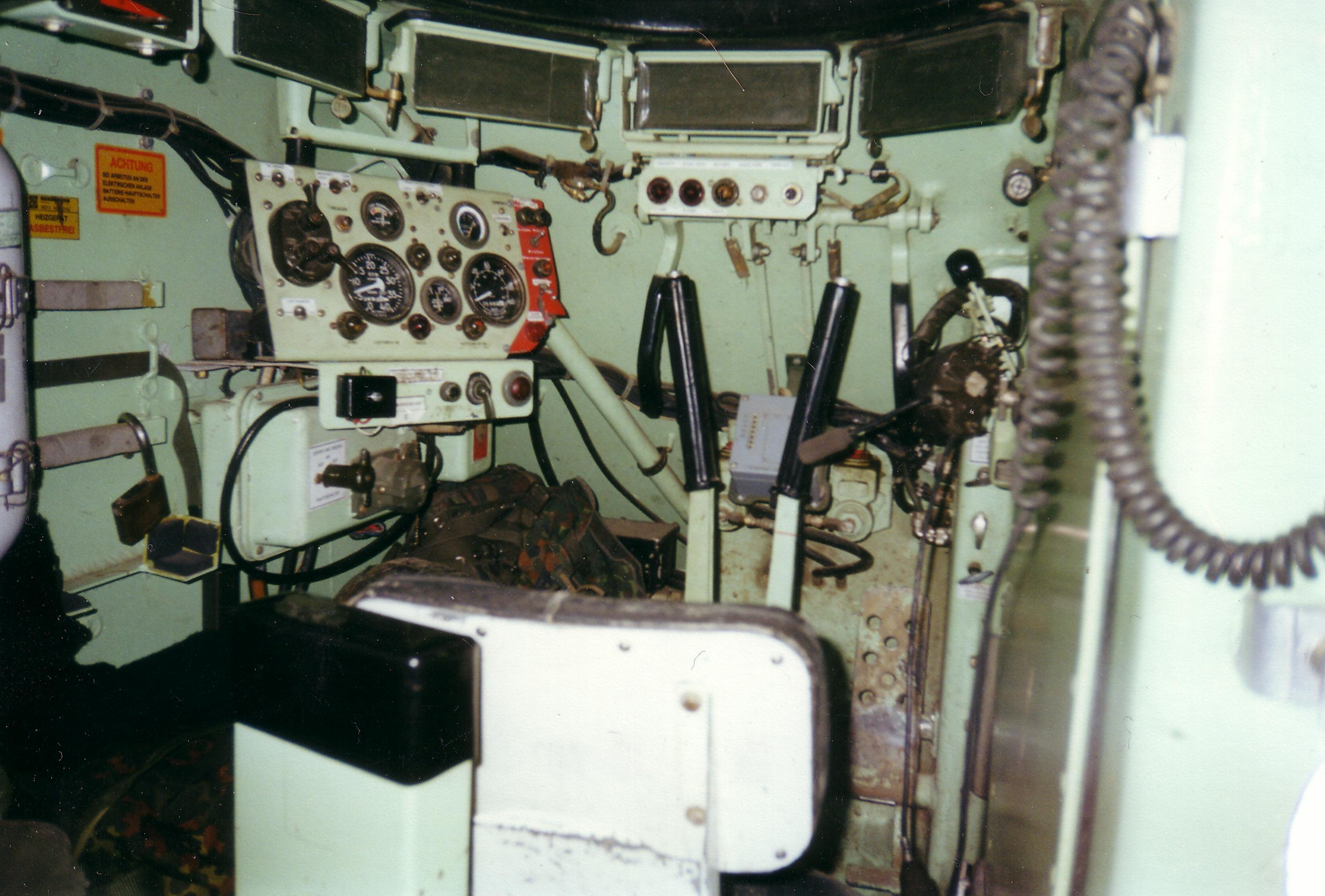 Fahrerplatz in einem M113_A1_(EFT)_GE der Bundeswehr. Die Winkelspiegel sind abgedeckt. Zwischen den Lenkbremshebeln die Kontrolle der Feuerwarnlöschanlage des Triebwerkraumes